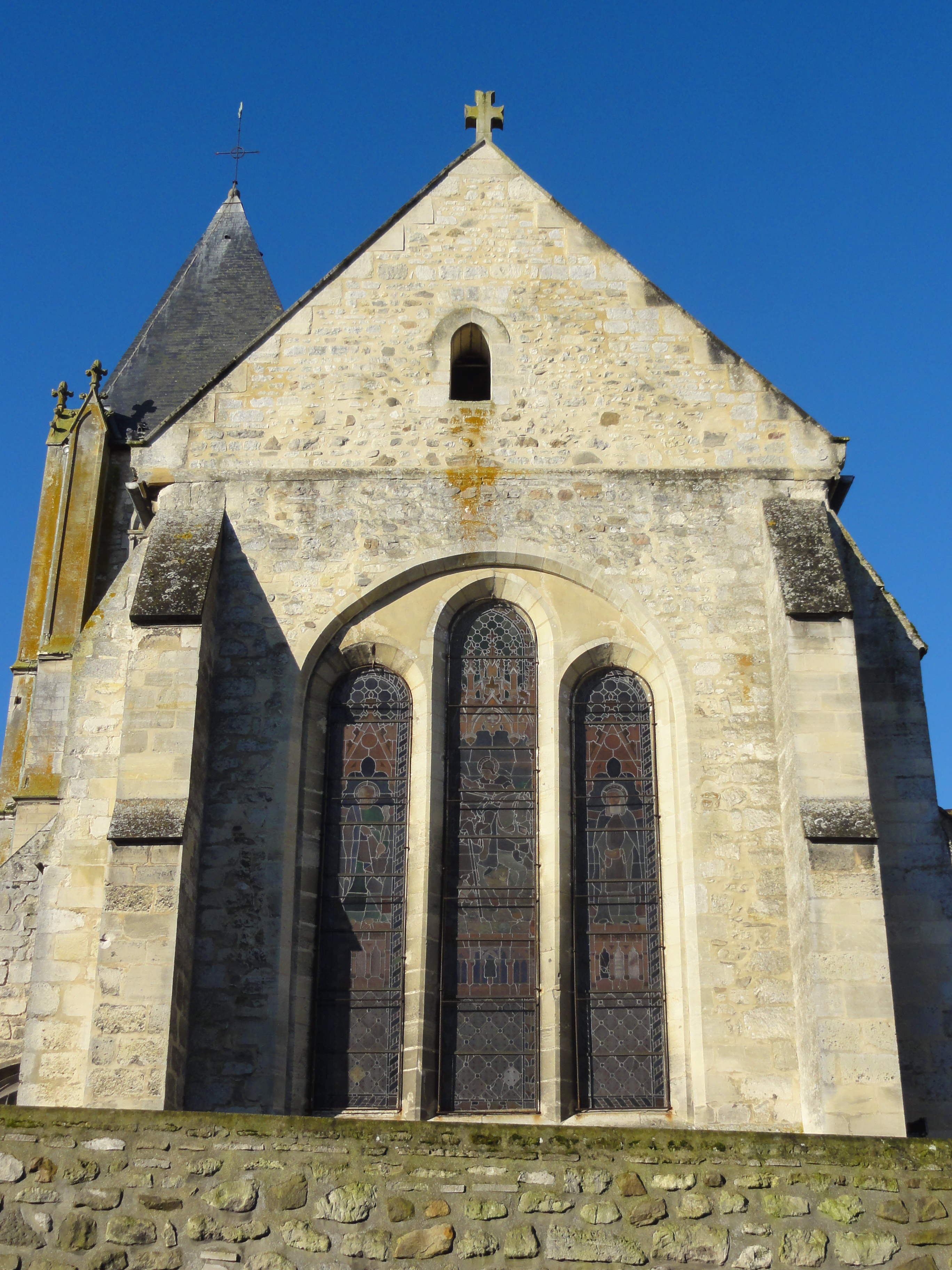 Voir titre.